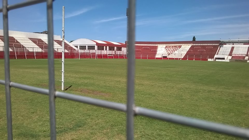 Estadio Eduardo Gallardon